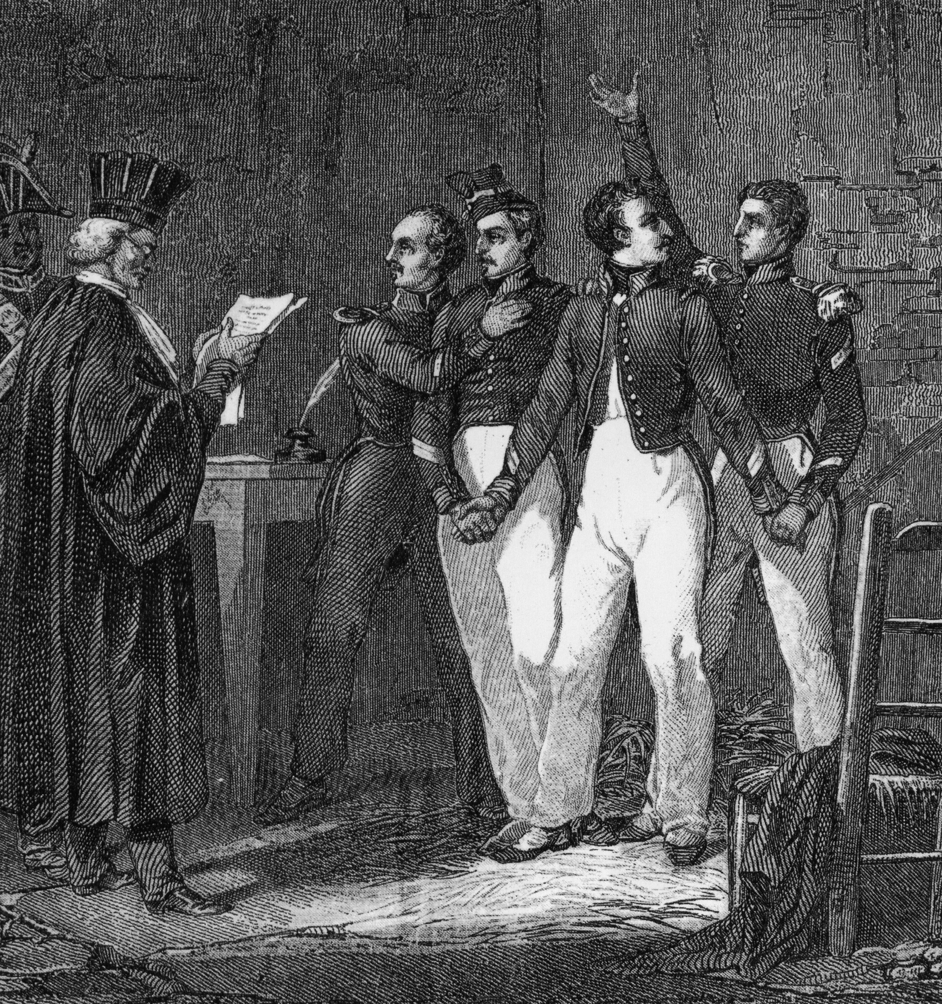 Les quatre sergents de La Rochelle peu avant leur execution en 1822.